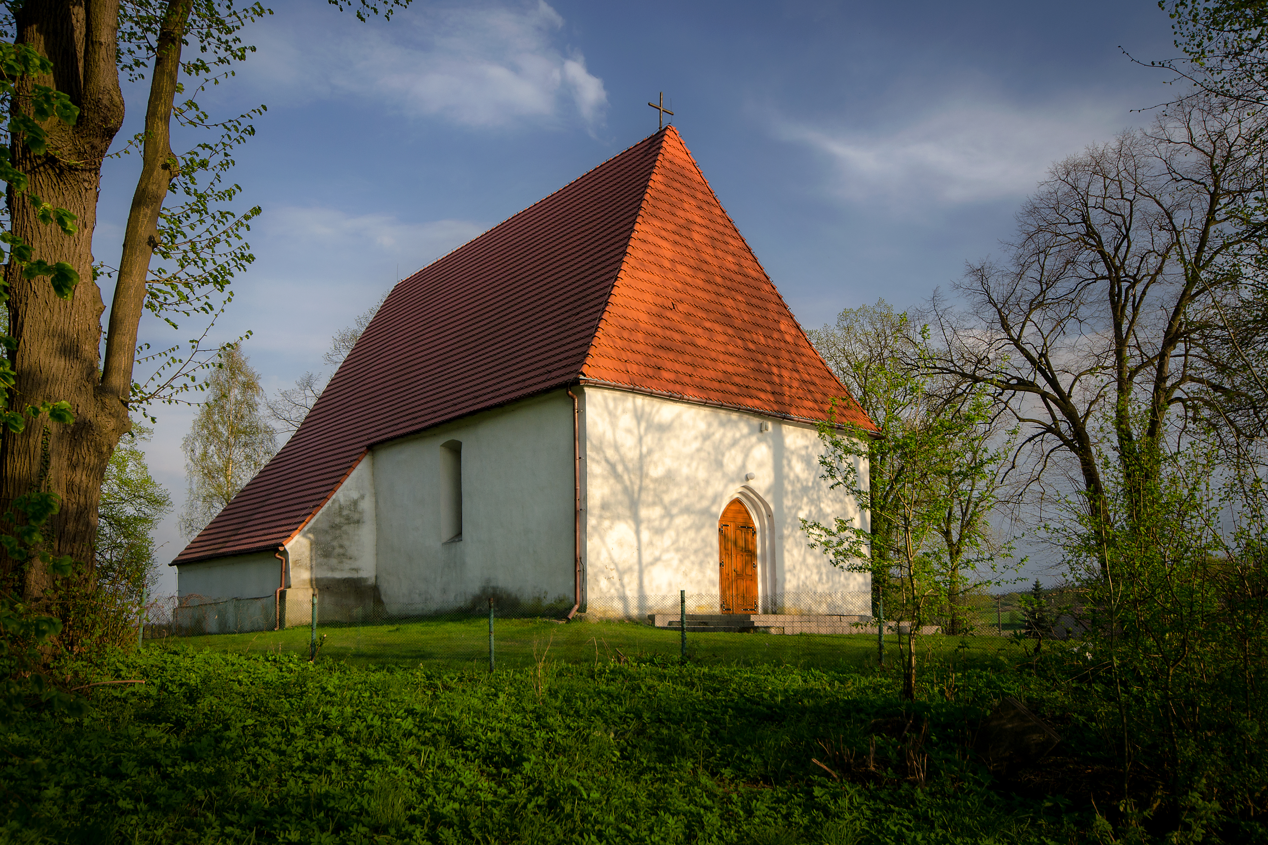 Rynarcice, kościół fil. p.w. św. Marcina, XV, XVIII